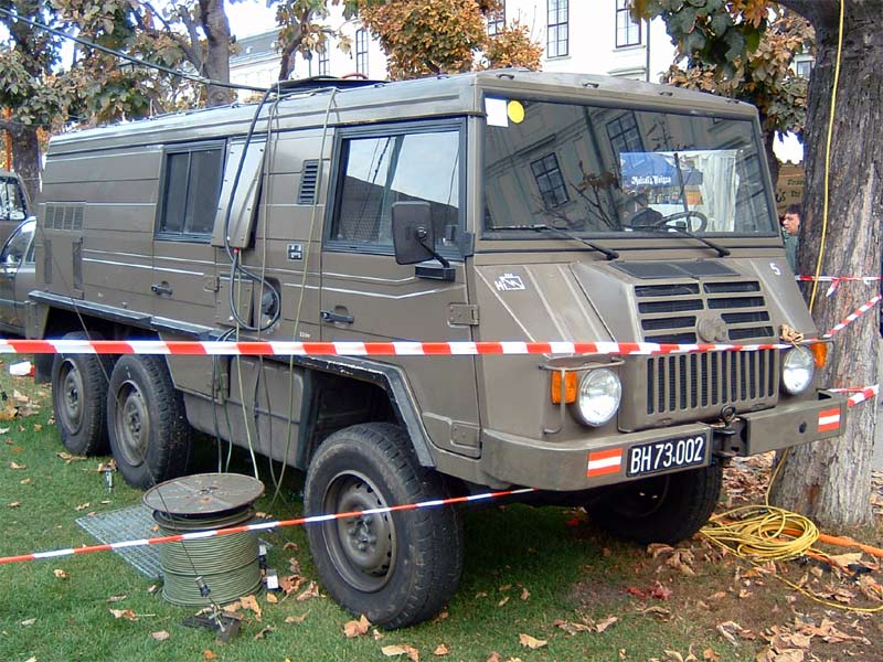 Das Foto zeigt einen Pinzgauer 718K P80 Turbodiesel eines Fernmelde-Regimentes des Österreichischen Bundesheeres. (Das Foto wurde am 26. 10. 2005 im Zuge der 50-Jahre-Bundesheer Feierlichkeiten am Wiener Heldenplatz geschossen.)